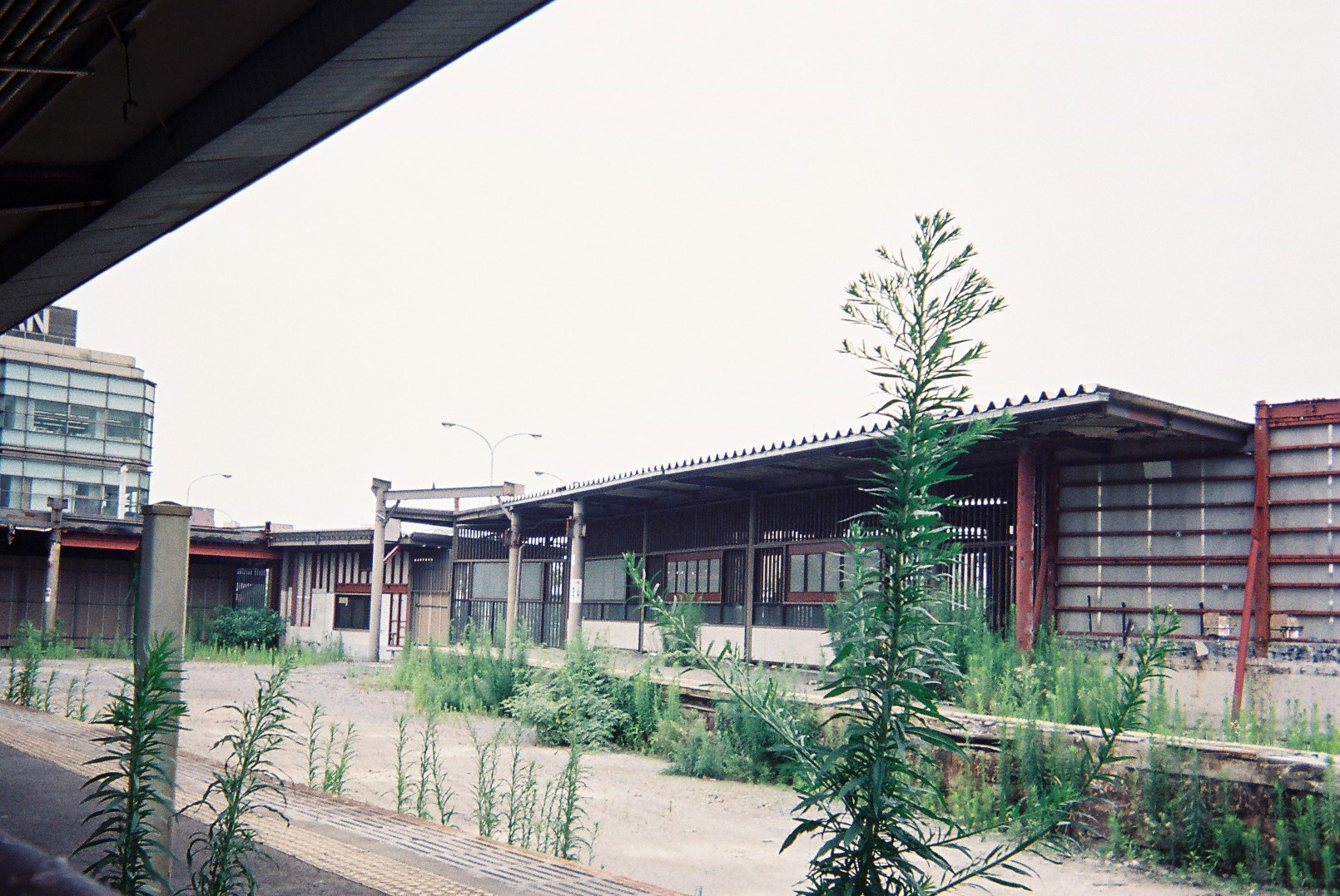 京阪電気鉄道・京津線京阪三条駅跡地（1999年7月撮影）